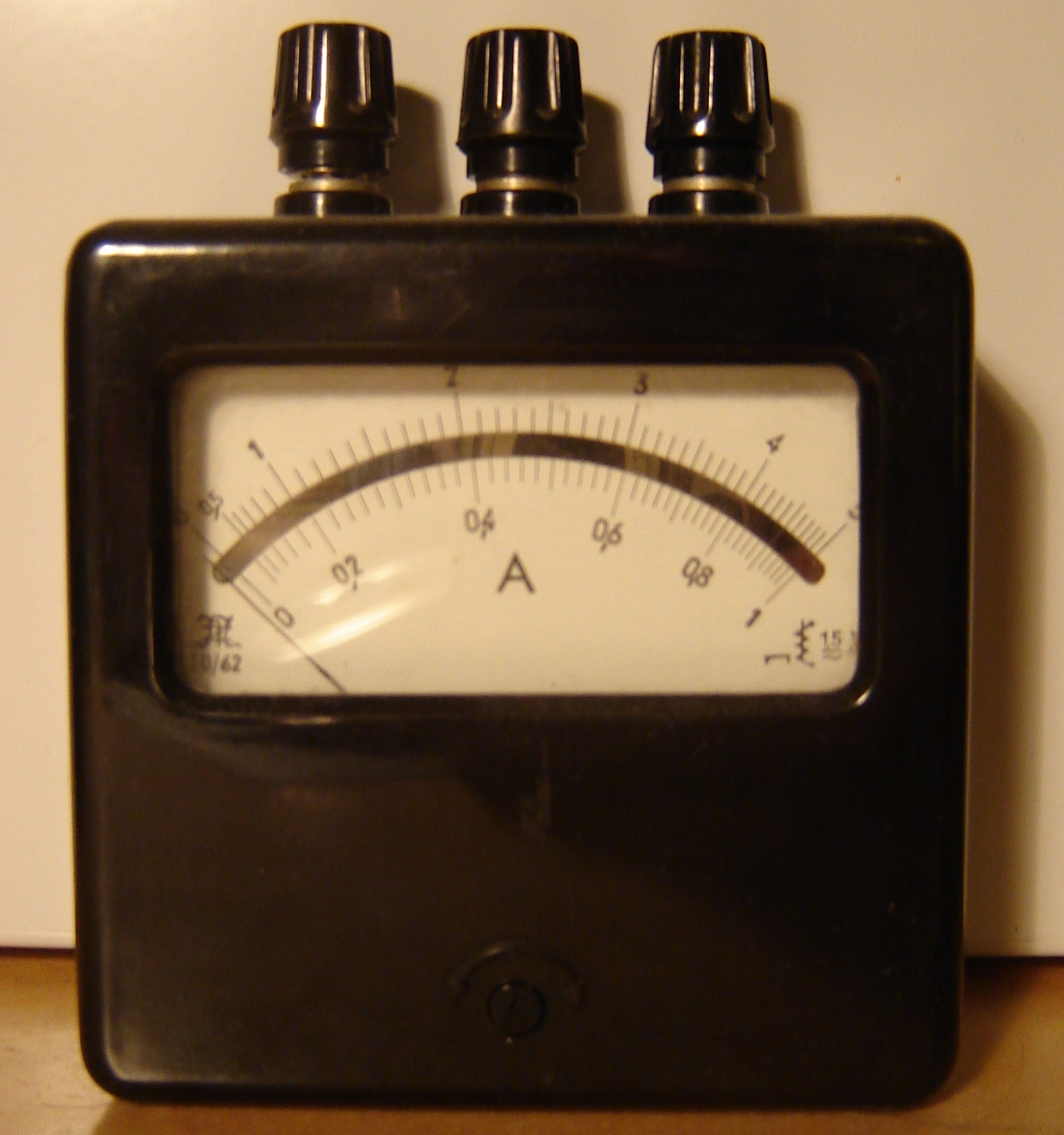 Analog ammeter. Photographer:Anders Jonsson